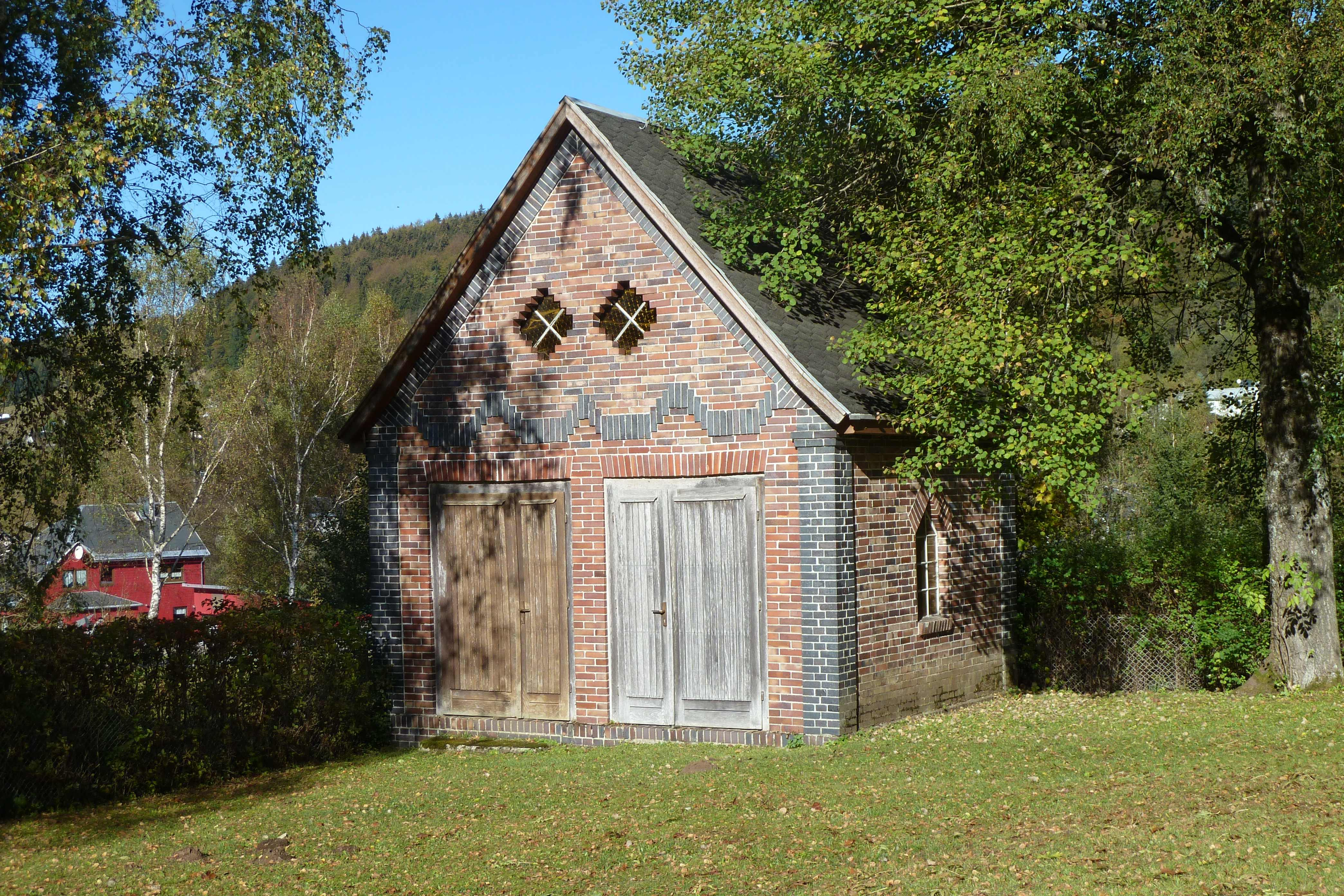 Friedhof, Leichenhalle, um 1930, Scheibe, OT von Scheibe-Alsbach